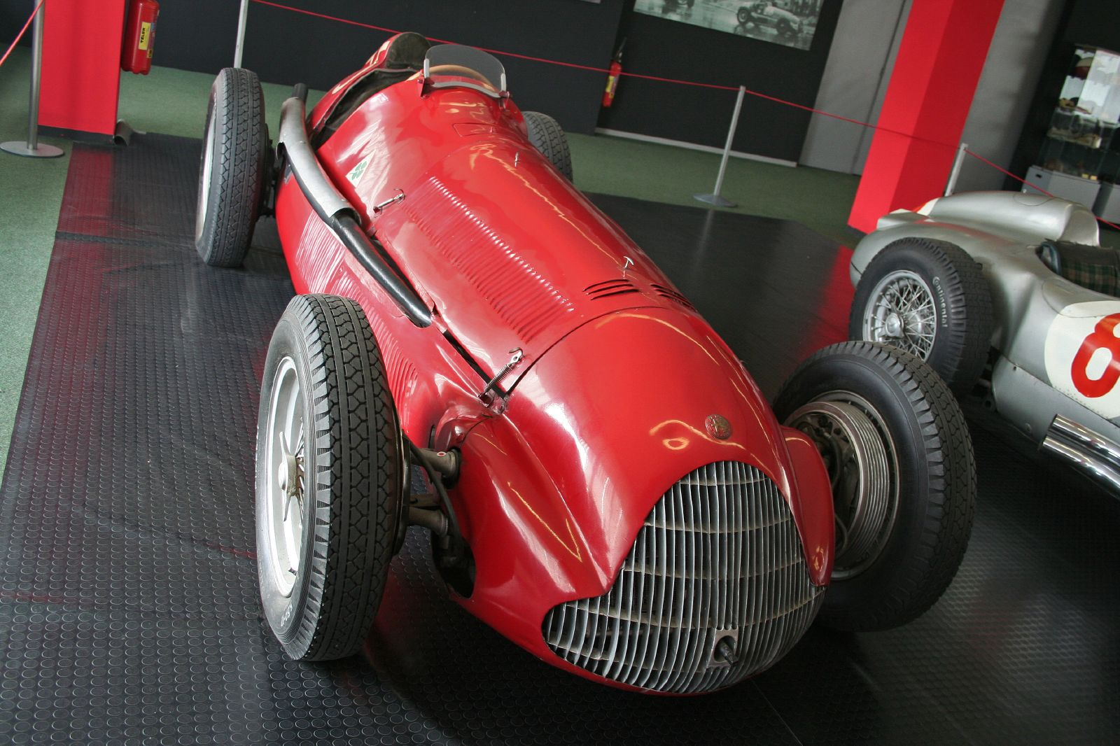 Alfa Romeo Alfetta 159 Grand prix del 1951